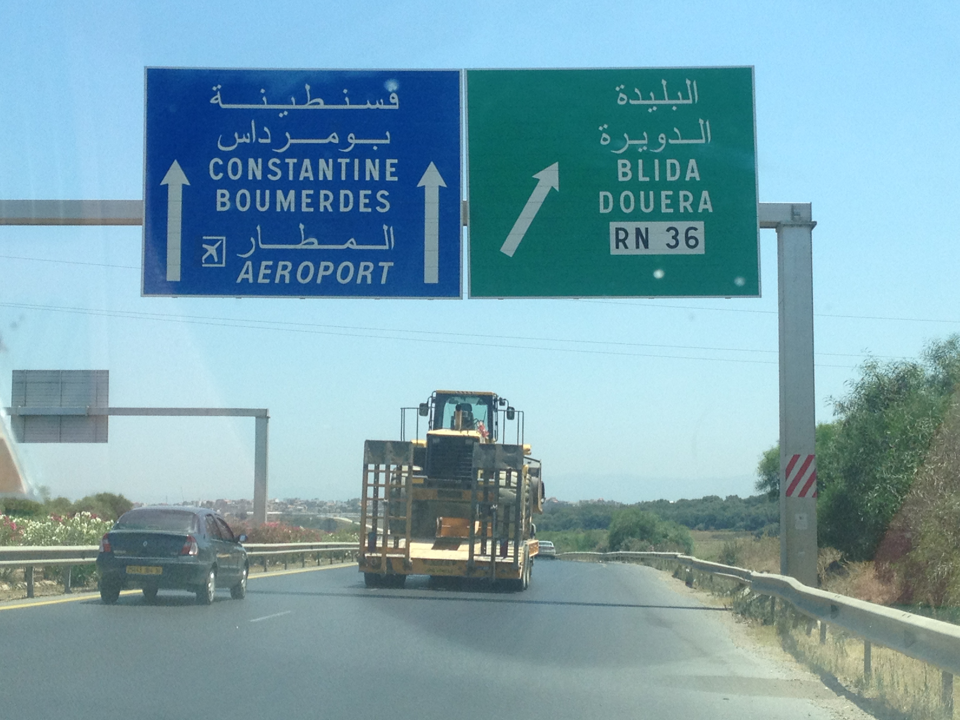 2e Rocade Sud d'Alger au niveau de douera sur l'autoroute